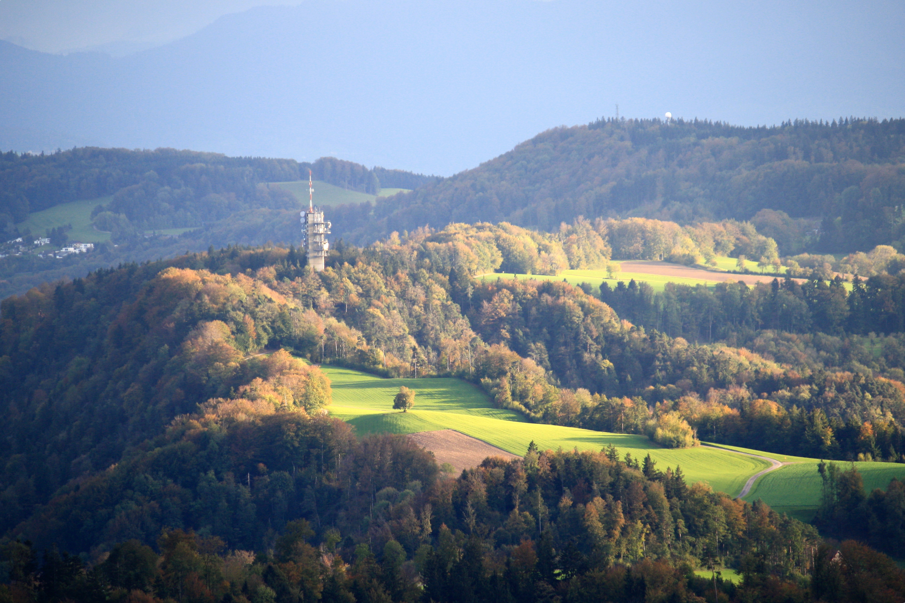 Felsenegg as seen from Uetliberg Aussichtsturm